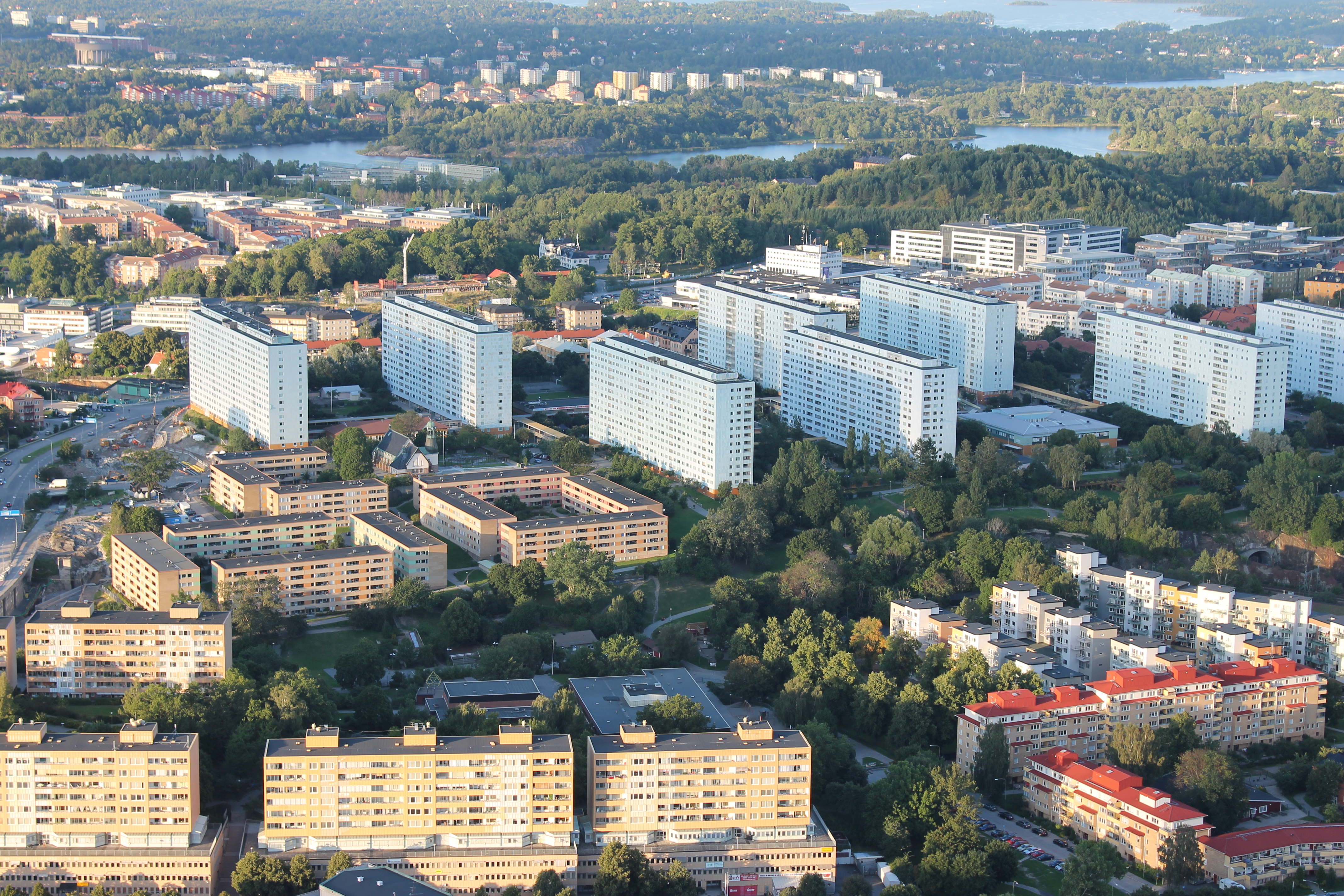 Stadsdelen Hagalund i Solna kommun, Sverige.